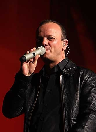 Autore: Vincenzo Iaconianni Fonte: Fotoguru.it Descrizione: Il cantautore Gigi d'Alessio Licenza: CC-BY-SA 3.0